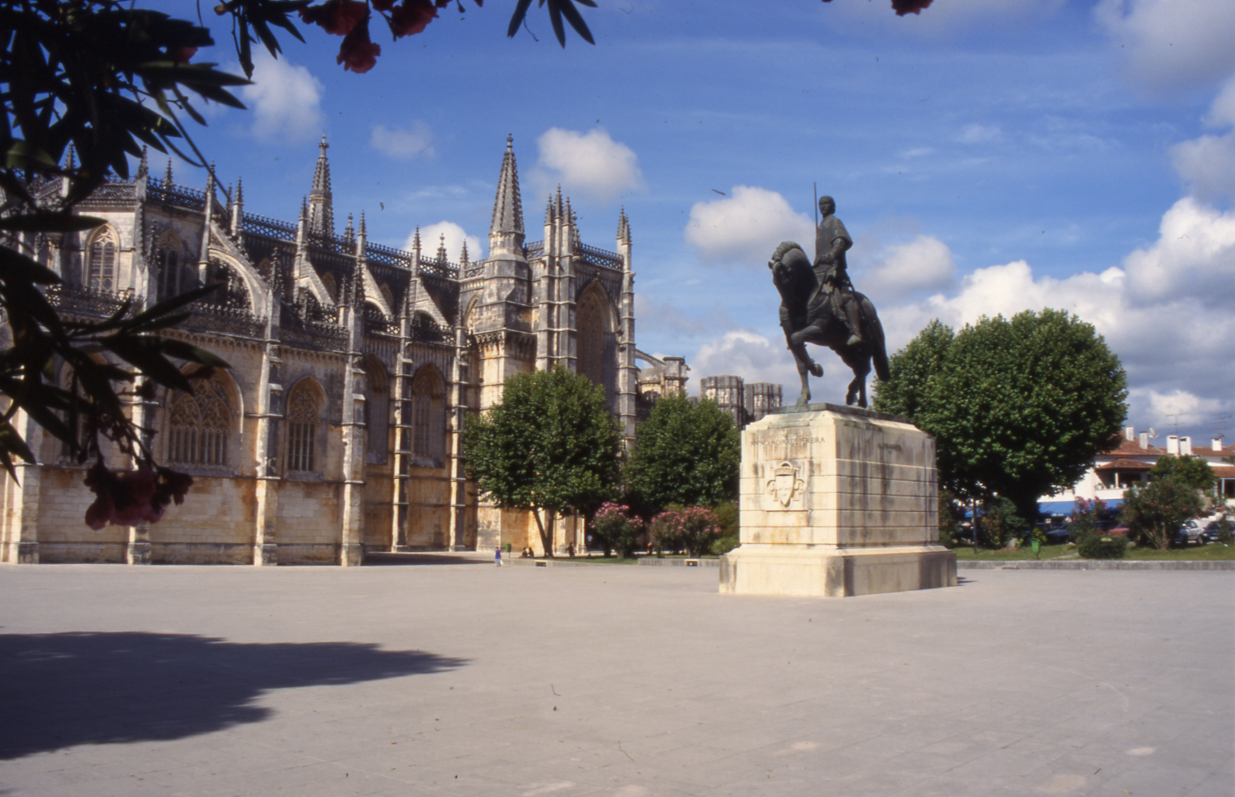 Mosteiro da Batalha Ansicht